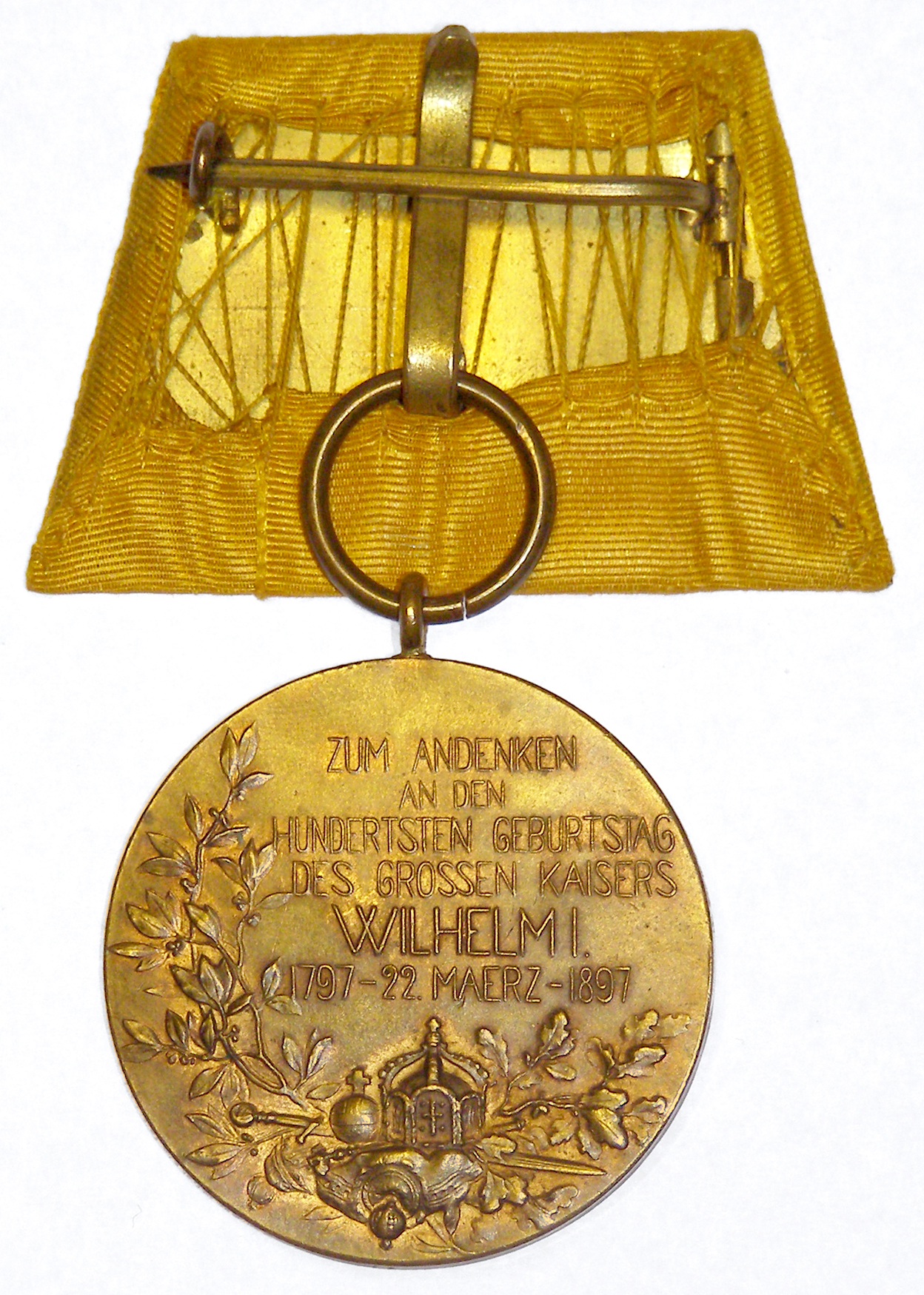 Kaiser Wilhelm-Erinnerungsmedaille (sog. Centenarmedaille)